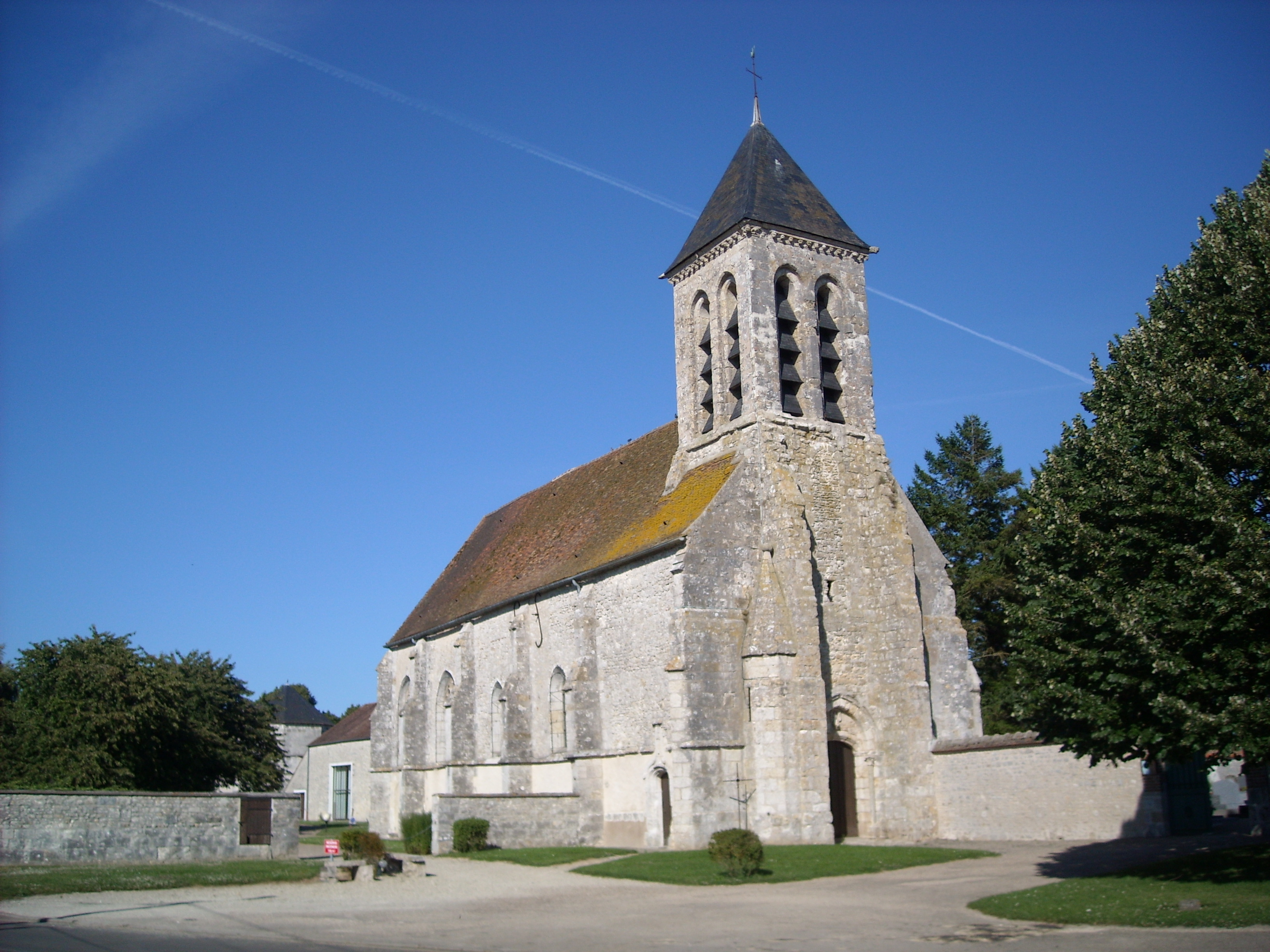 Eglise catholique de Guercheville Notre-Dame de l'Assomption. (département de la Seine-et-Marne, région Île-de-France).